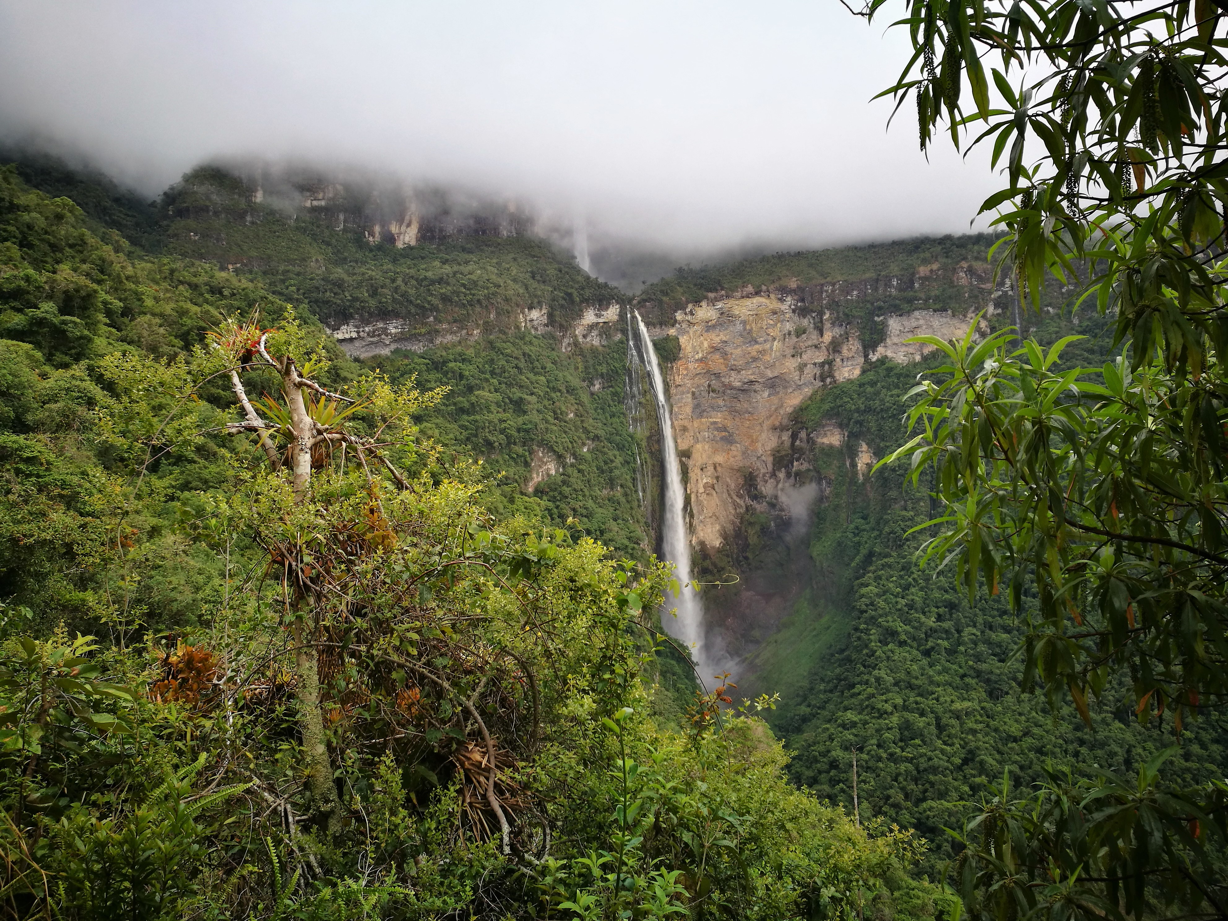 Vistes del Gocta des del mirador del gocta situat a la primer caiguda